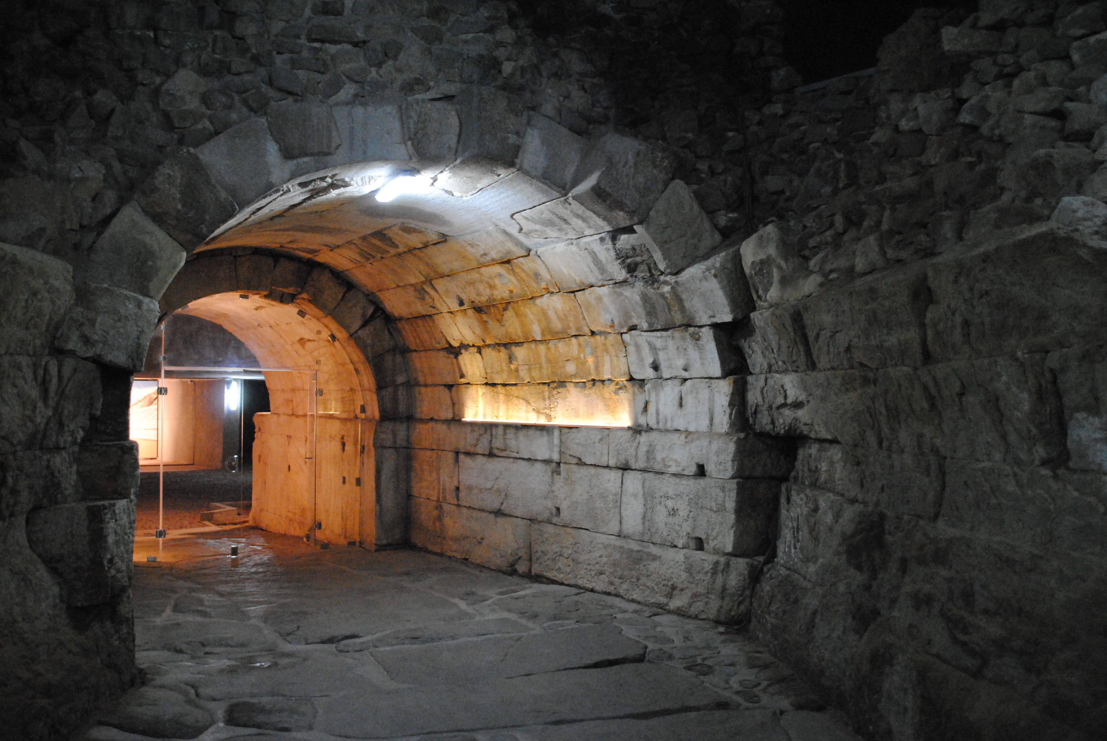 Римски стадион, Пловдив, България